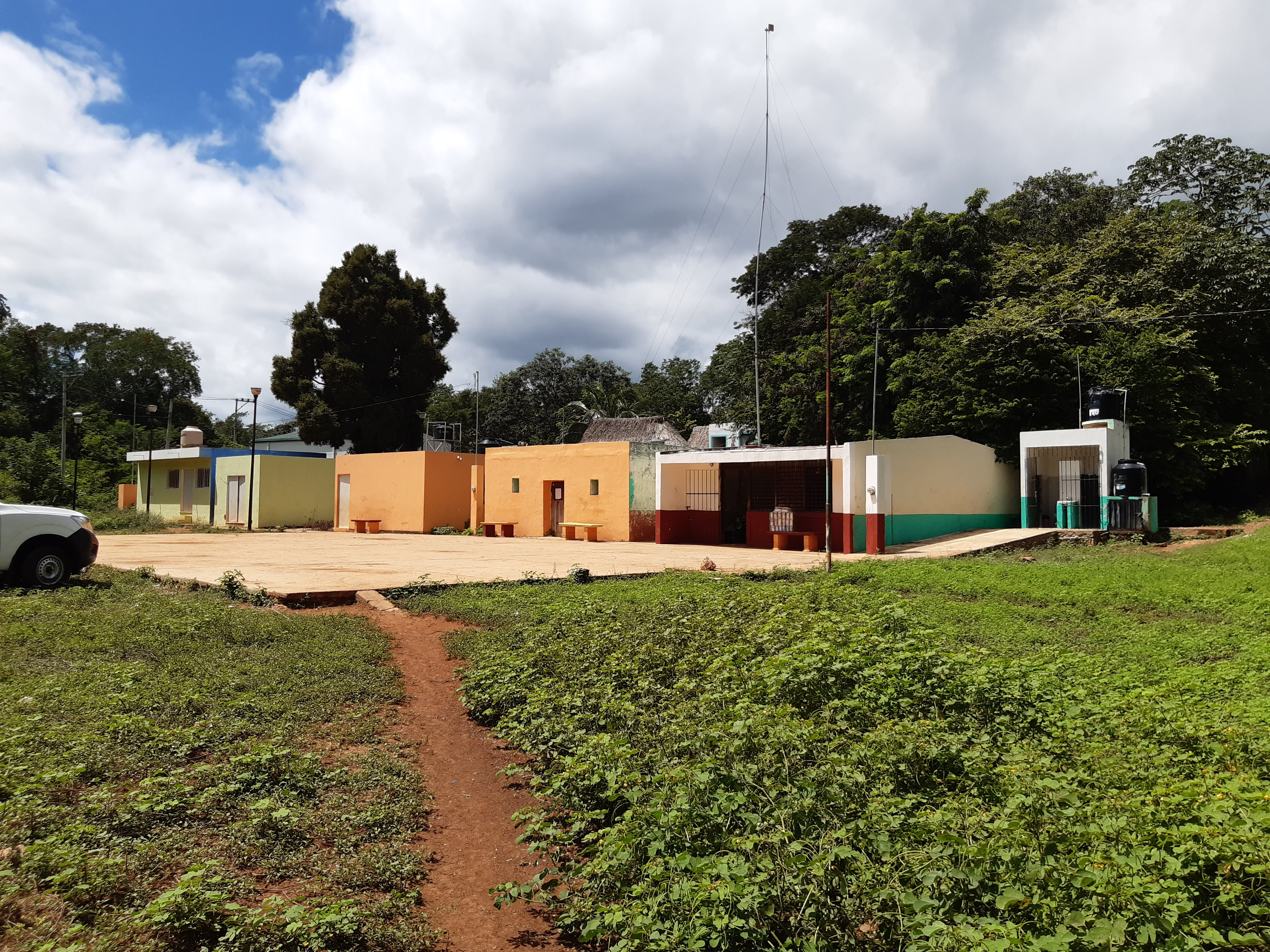 X-Pom, Yaxcabá, Yucatán.